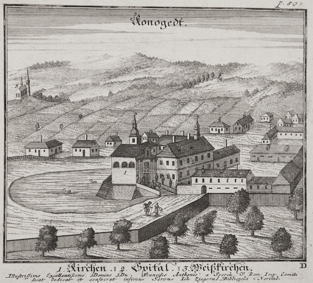 Kostel Nanebevzetí Panny Marie, Konojedy (Úštěk).